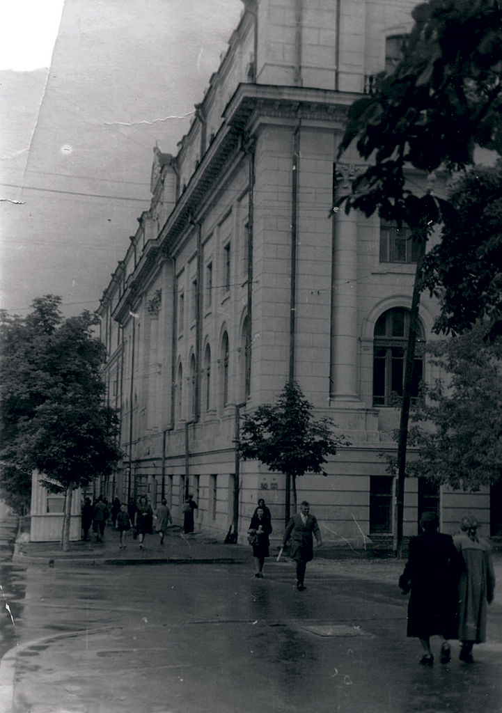 Корпус Київського державного педагогічного інституту імені О. М. Горького (з боку вул. І. Франка наприкінці 50-х років) На першому поверсі розташована бібліотека (Історія та сьогодення наукової бібліотеки, с. 286